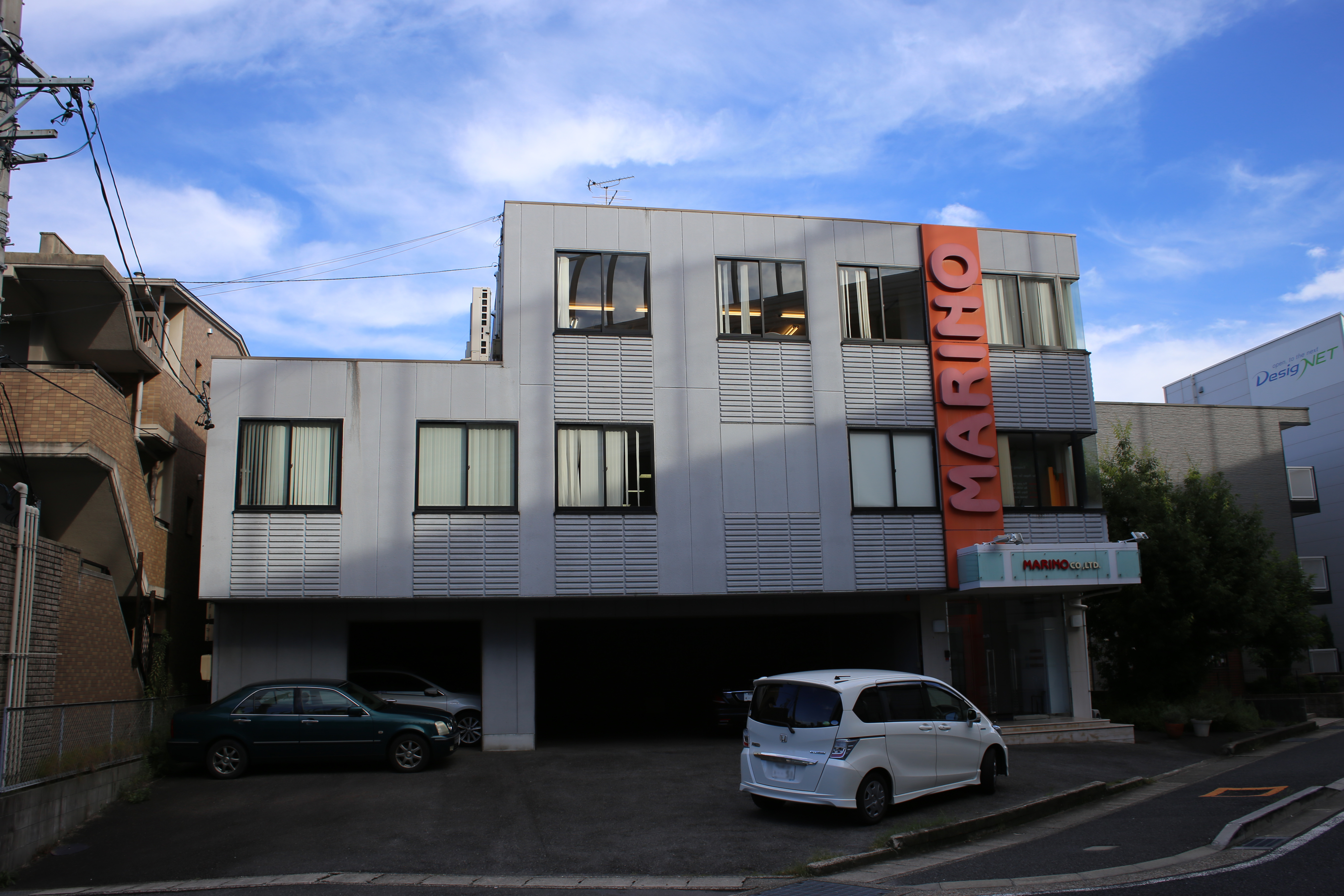 名古屋市名東区上社のマリノ本社を西側公道より撮影。ただし、ナンバープレートにつき画像処理済。